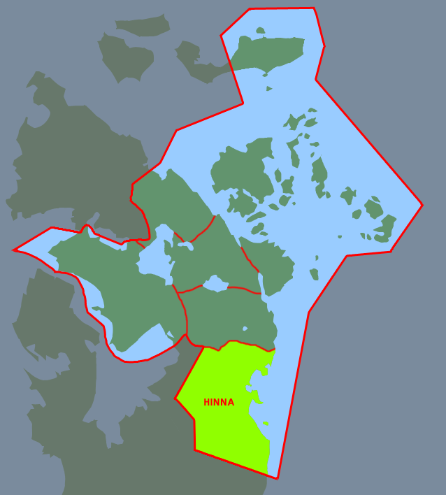 Map of Stavanger.